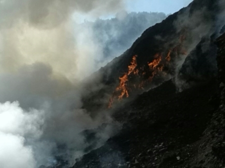 Српски (ћирилица): Пожар у Ибарским рудницима, 2015. година